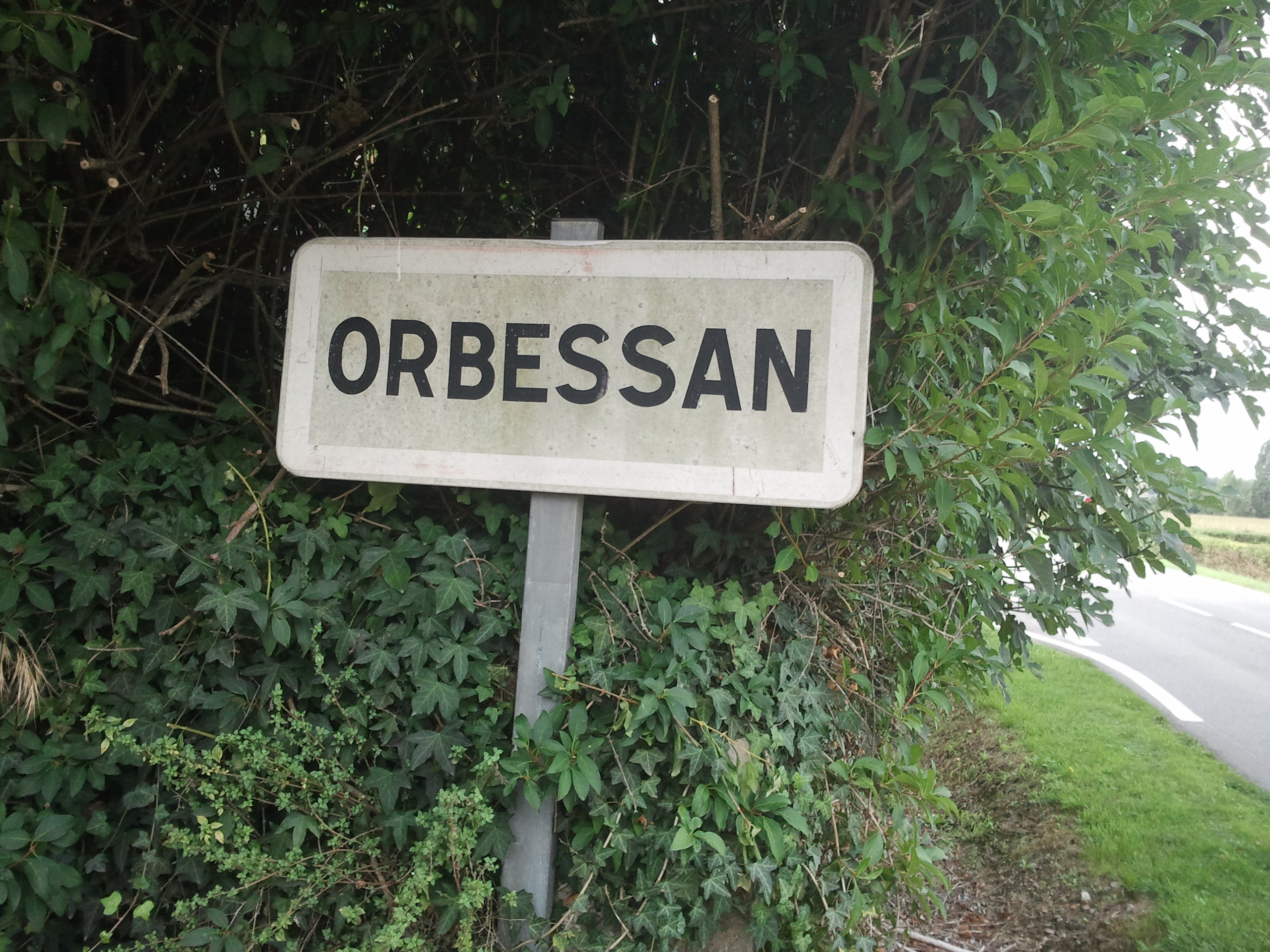 Panneau à Orbessan sur la D929